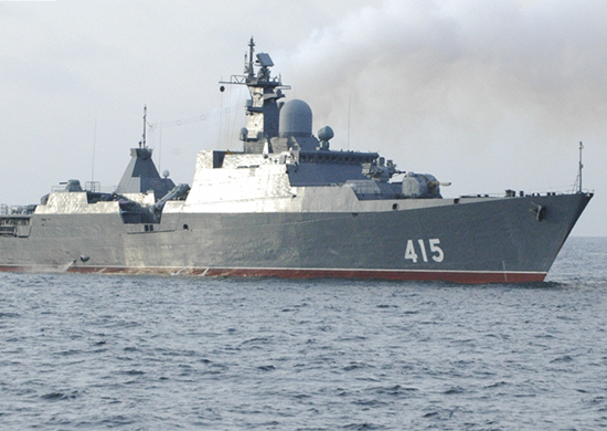 Новороссийская военно-морская база